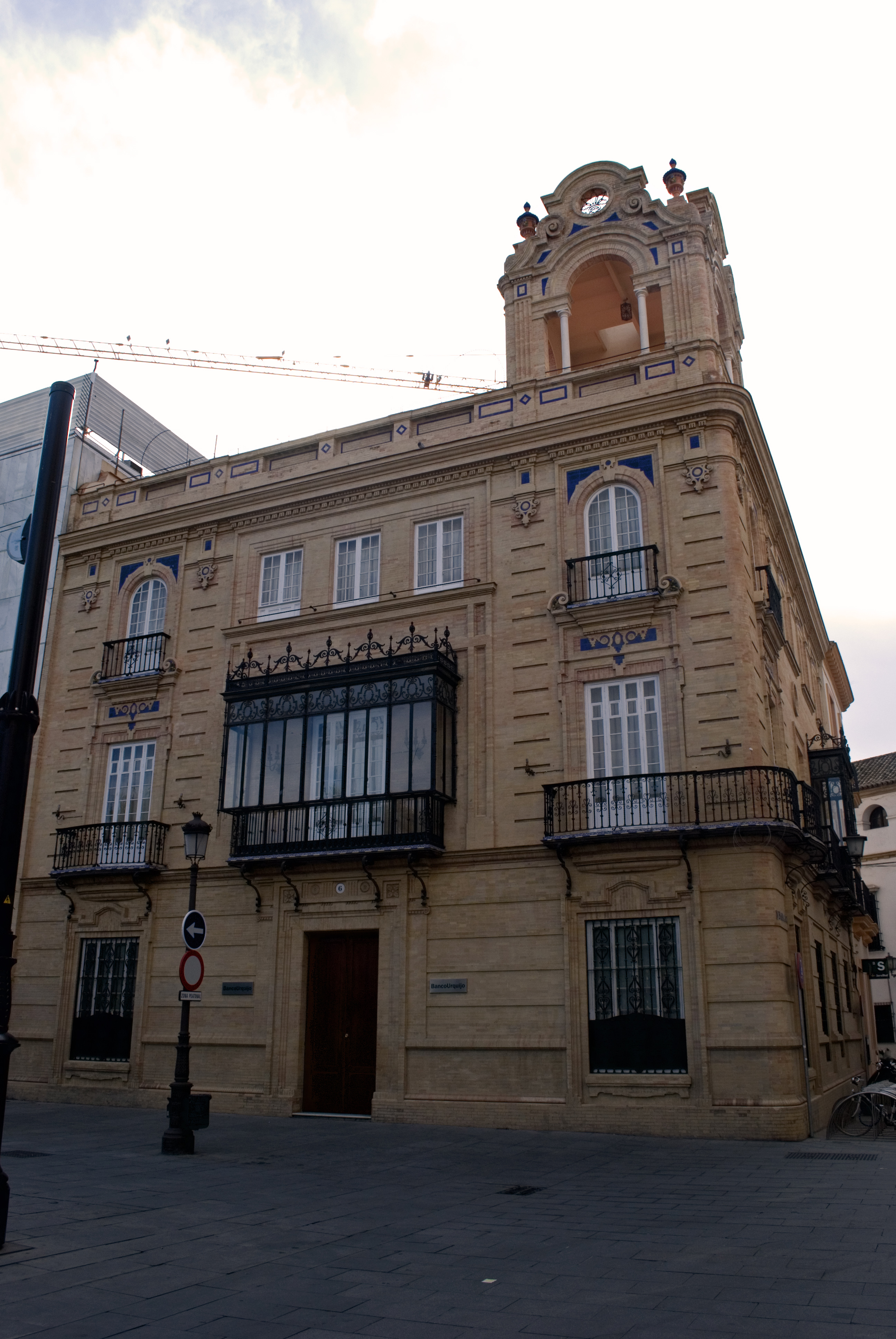 Casa para Miguel García de Longoria en Plaza Nueva, esquina calle Badajoz Sevilla(1917-1920)